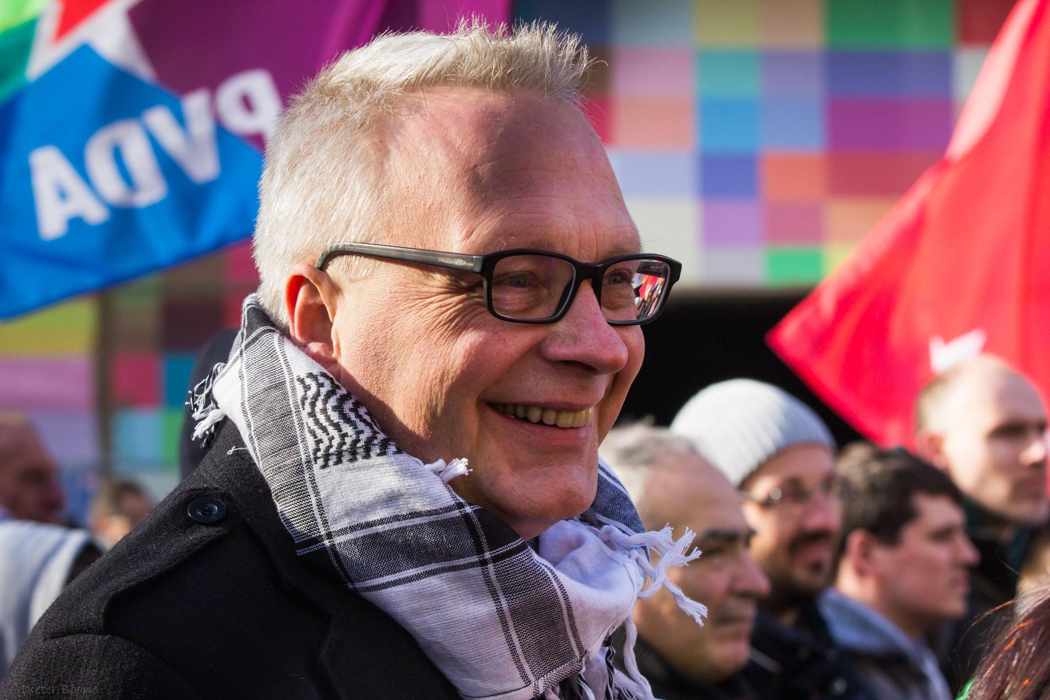 Peter Mertens op PayBackDay, een betoging tegen Turteltaks. Genomen op het Muntplein te Brussel, 29 februari 2016.